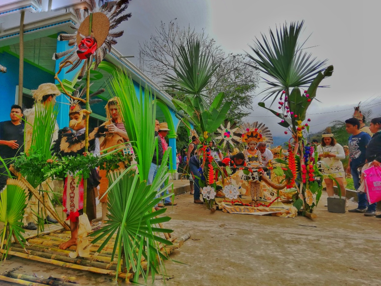 El desfile de los niños se caracteriza porque sus trajes los han hecho sus mamás, abuelas, tías totalmente a mano, el resultado¡Increíble!